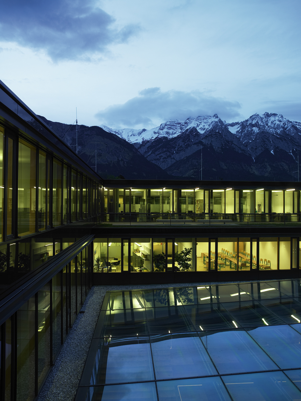 Private Universität für Gesundheitswissenschaften, Medizinische Informatik und Technik